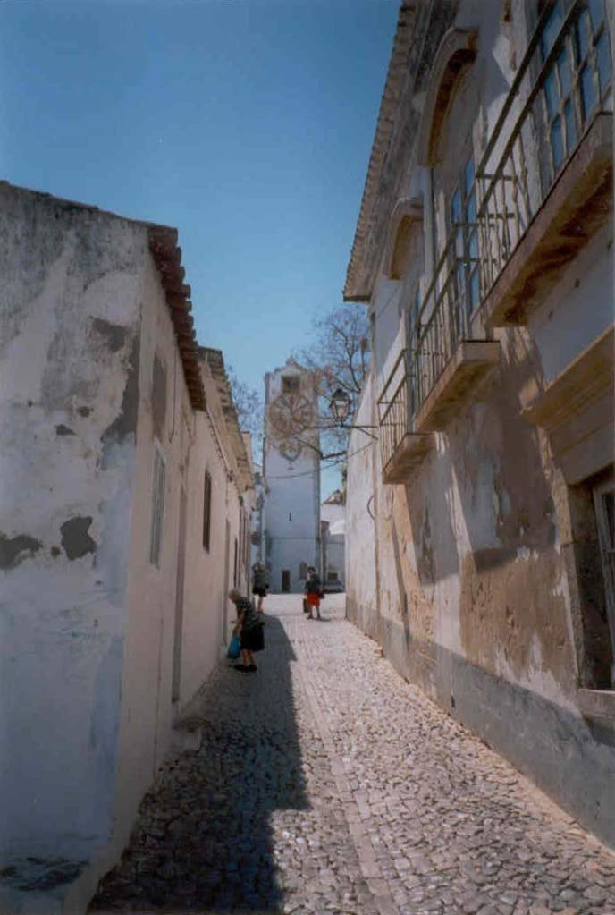 Tavira - Portugal